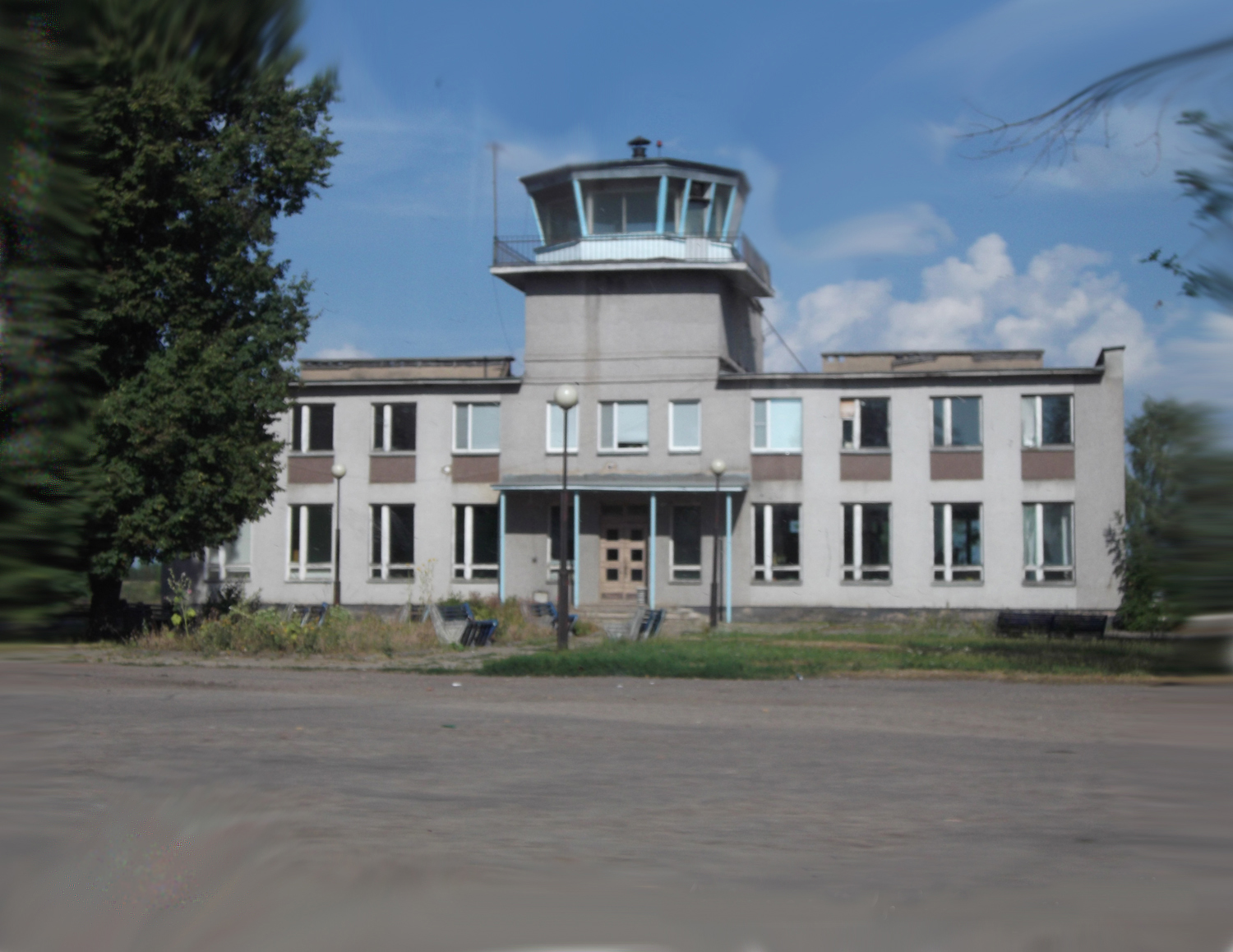 Аэропорт Великих Лук